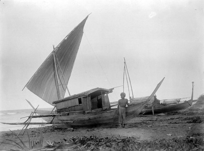 Repronegatief. Naast de grotere types vaartuigen, zoals de orembaai en de kora-kora, wemelde het in de Molukken van de kleinere types, geschikt voor visvangst, handel langs de kust, handel tussen dicht bij elkaar gelegen eilanden en uiteraard het vervoer van kleine groepen mensen. Dit soort boten werd veelal in de Molukken zelf gebouwd. De simpelste types bestonden uit uitgeholde boomstammen, terwijl de wat grotere soorten werden opgebouwd met planken. In veel gevallen hebben deze boten uitleggers of vlerken, zodat men ze ook wel als vlerkprauwen aanduidde. De verlengingbalken aan de voor- en achterkant van de boot, de stevenbalken, zijn vaak bewerkt en hebben een bijzondere betekenis. (P. Boomgaard, 2001). Halmahera, Pakata Tobelo (voorgrond) en rorehe